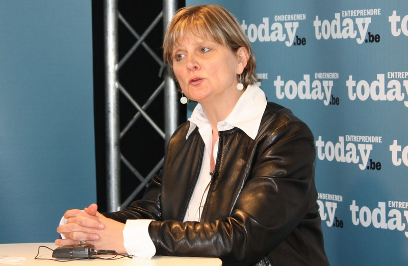 Entreprende today.be